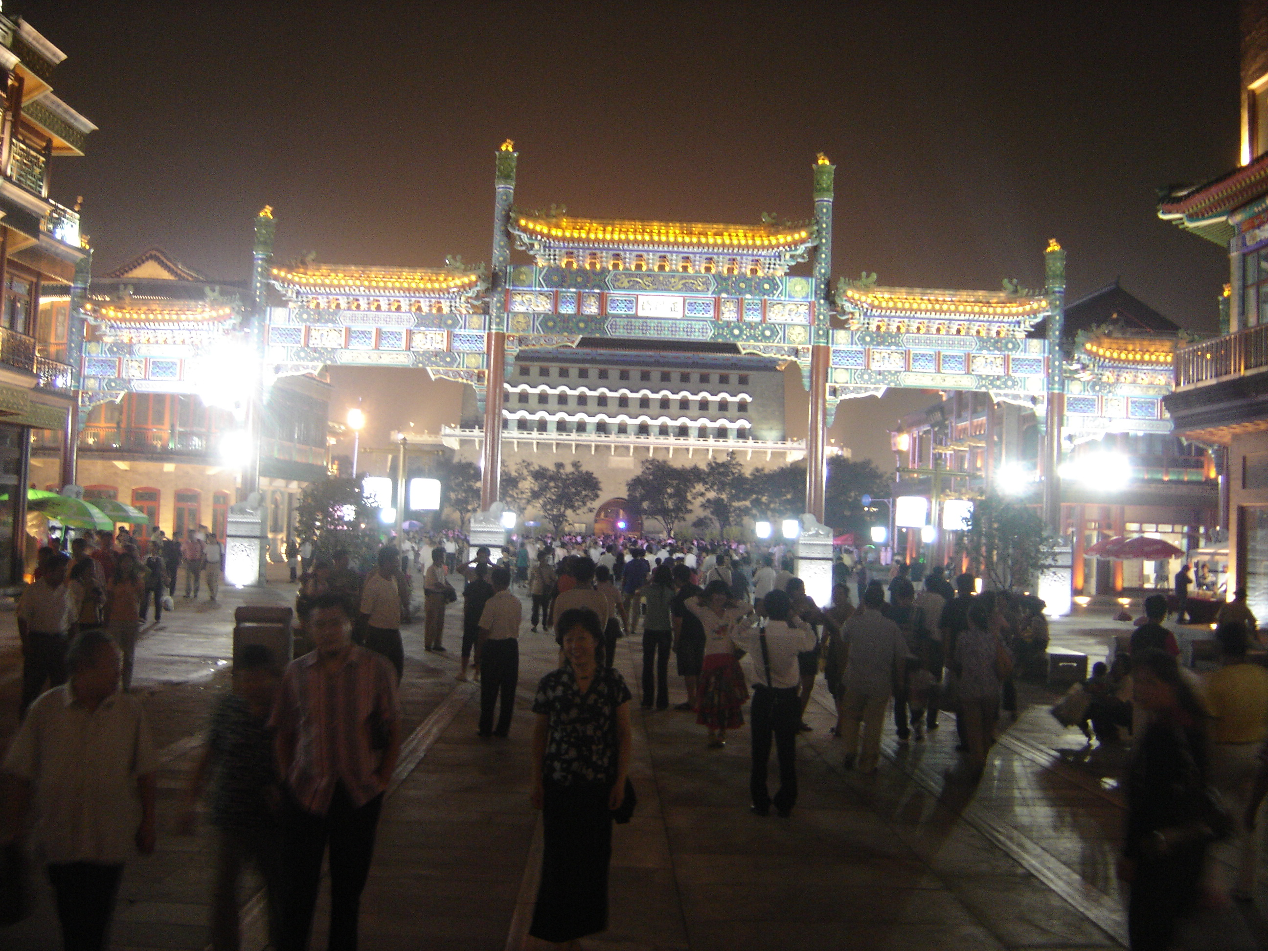 中文（中国大陆）: 前门大街